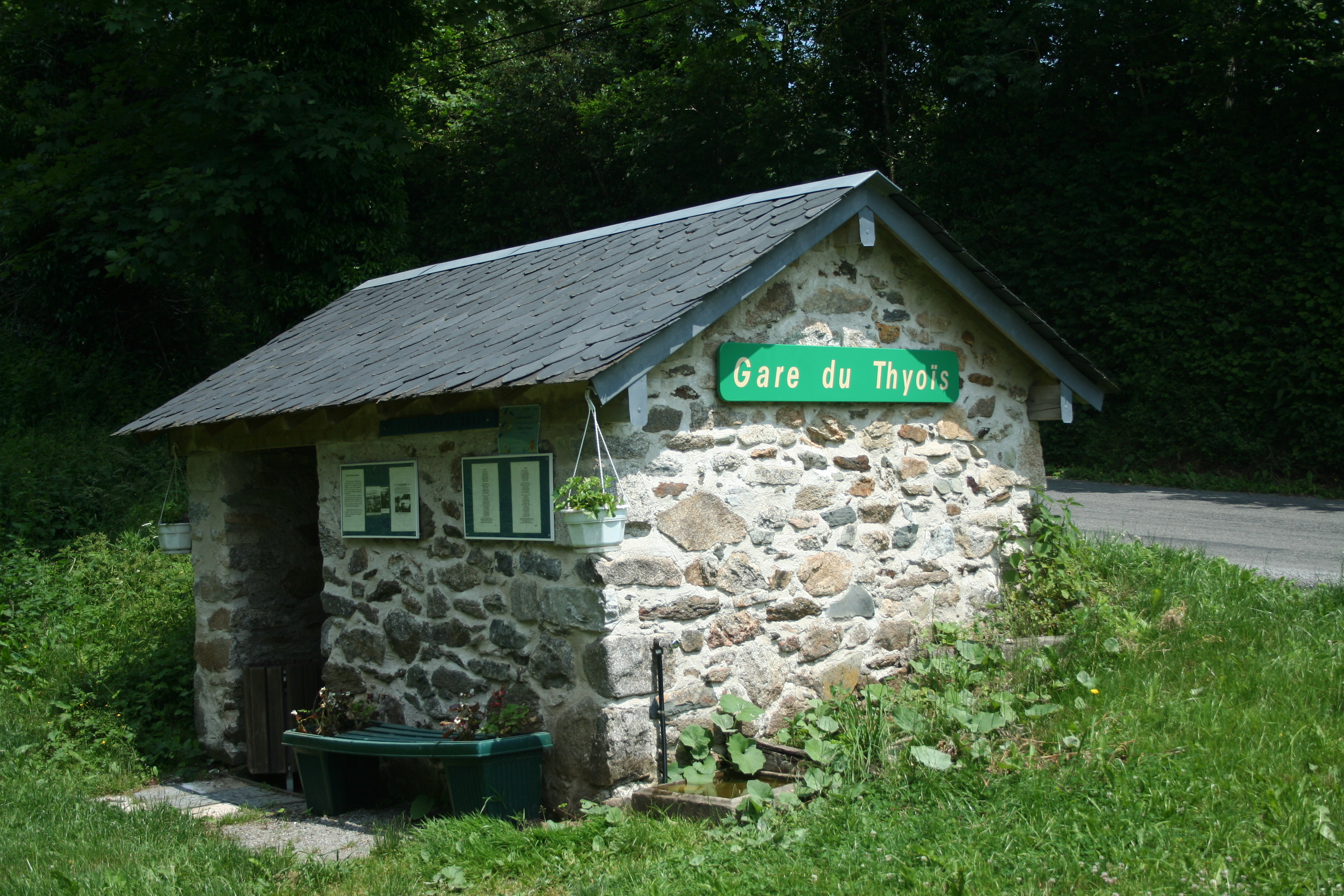 Lacaune (Tarn) - gare du Thyoïs de l'ancienne ligne Castres-Murat (fermée en 1962)